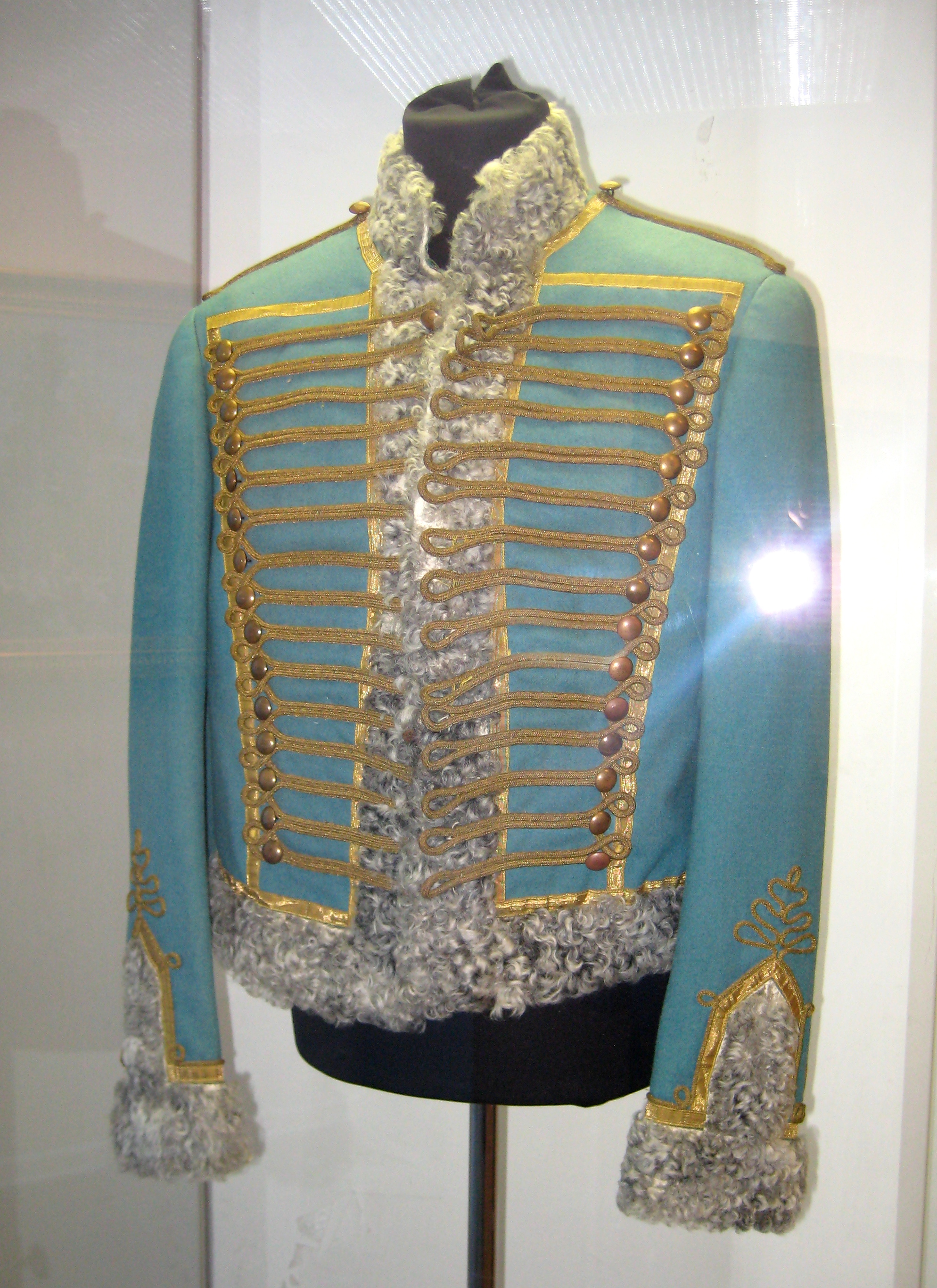 Ментик офицера Павлоградского полка (В.Д. Денисова) со съемок худ. фильма "Война и мир". 1960-е. Музей "Бородинская панорама"